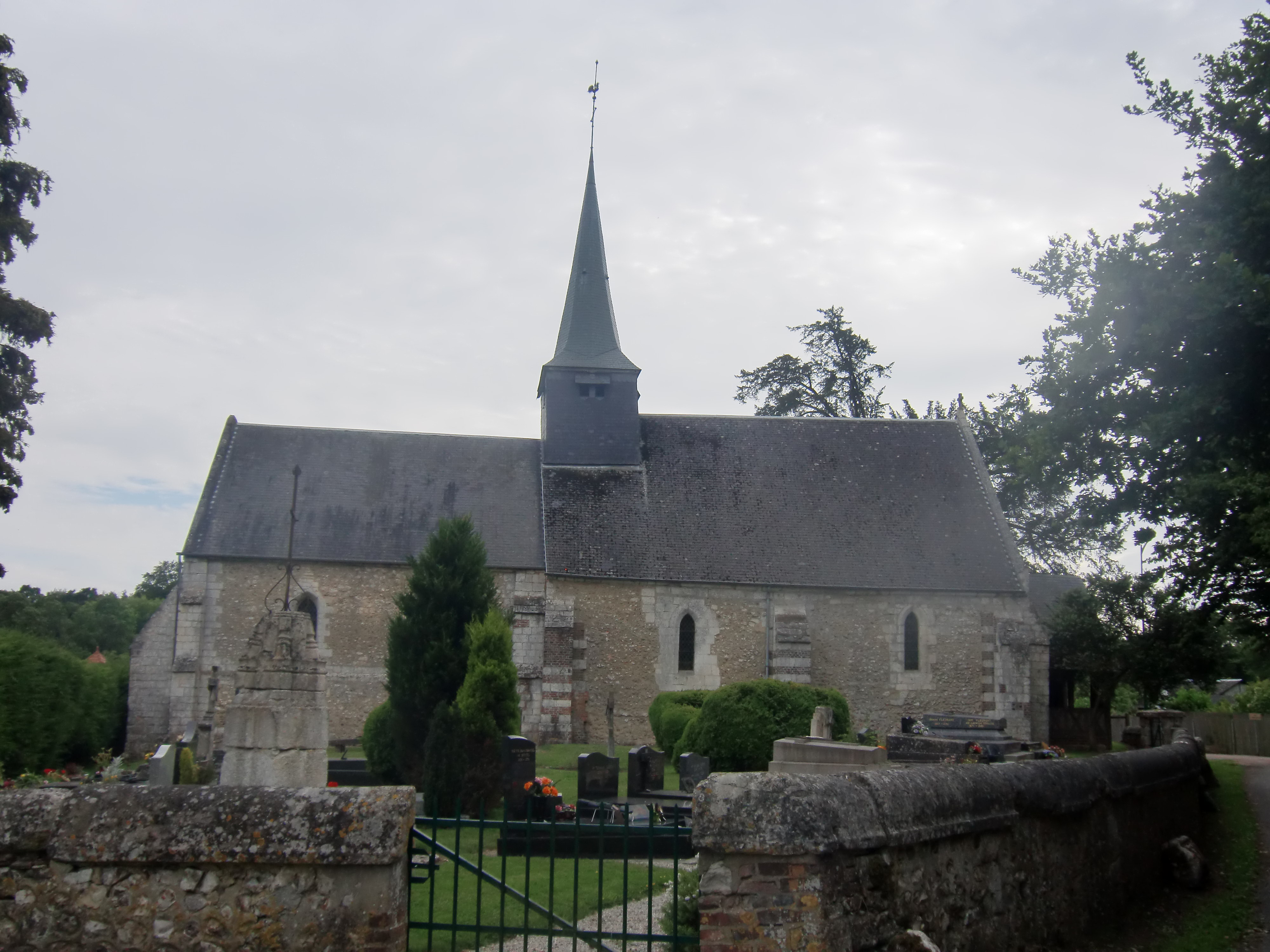 Église de Touville (Eure, Normandie, France)